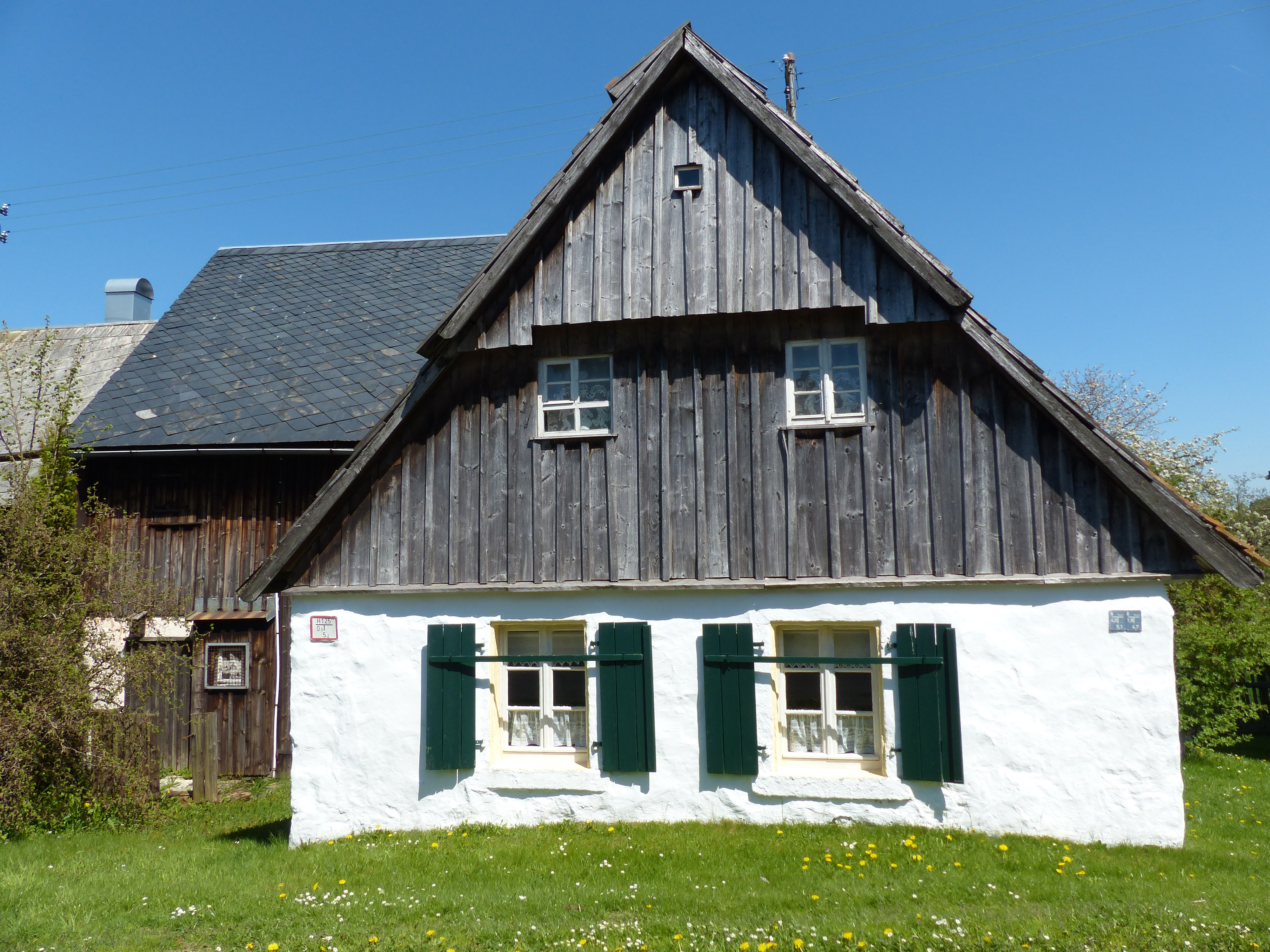 Bilderserie Ortsansichten von Kleinschwarzenbach, darunter Baudenkmäler und Weberhäuser